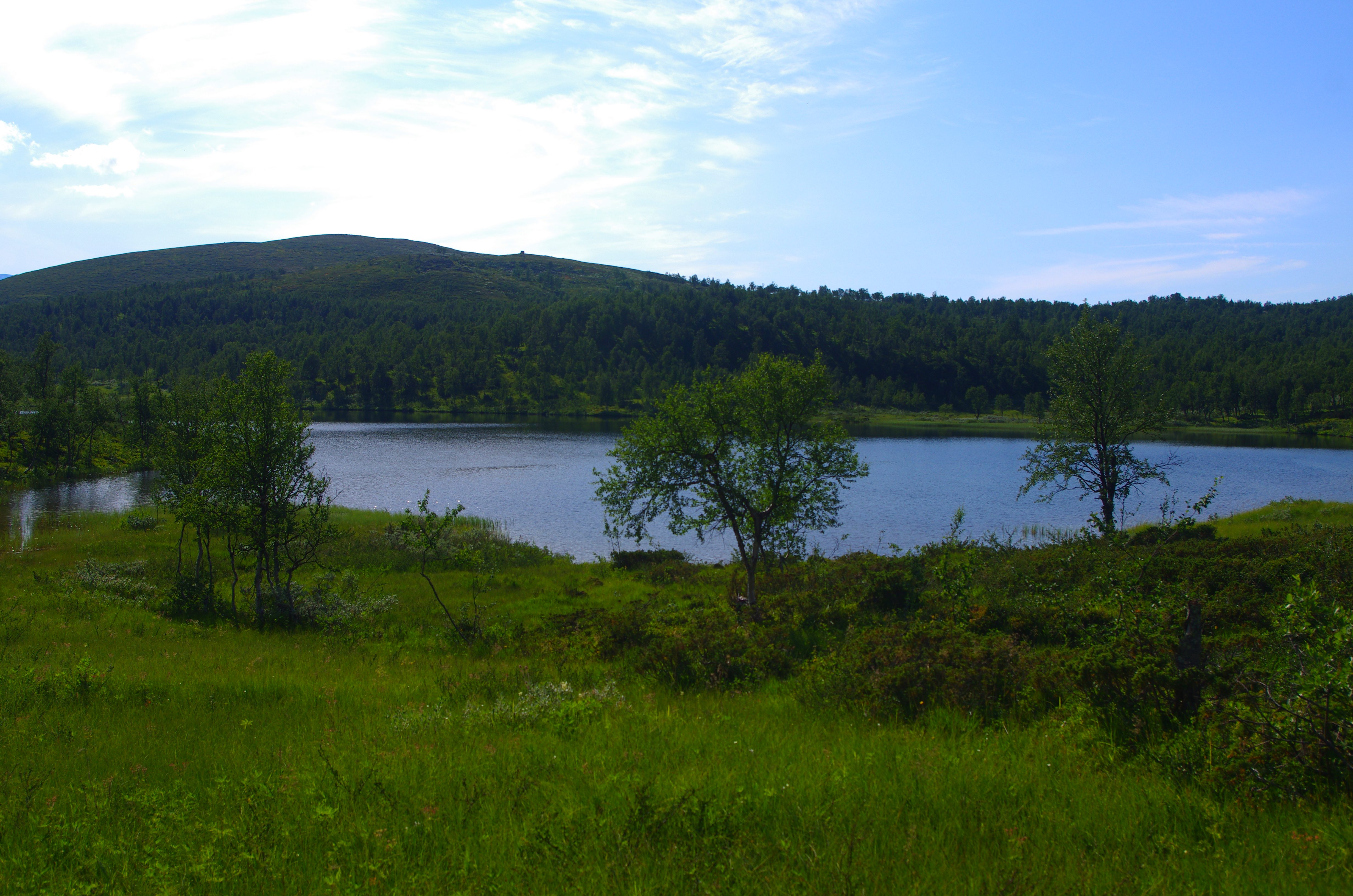 Gukkesjaure eller Tjärven är en sjö i Sorsele kommun i Lappland i Sverige. Kungsleden passerar sjön.